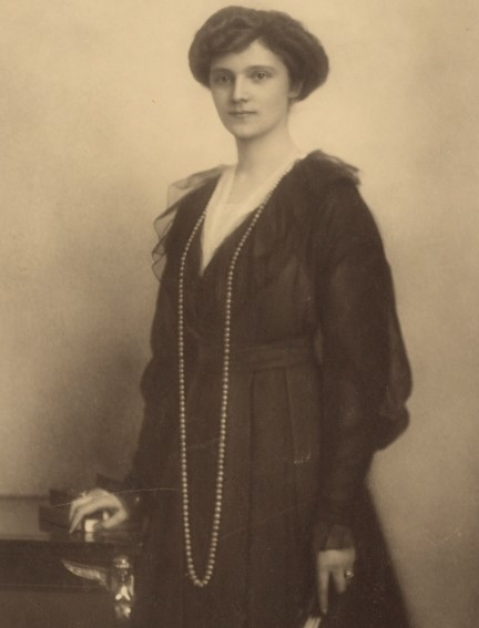 Zita, Kaiserin von Österreich